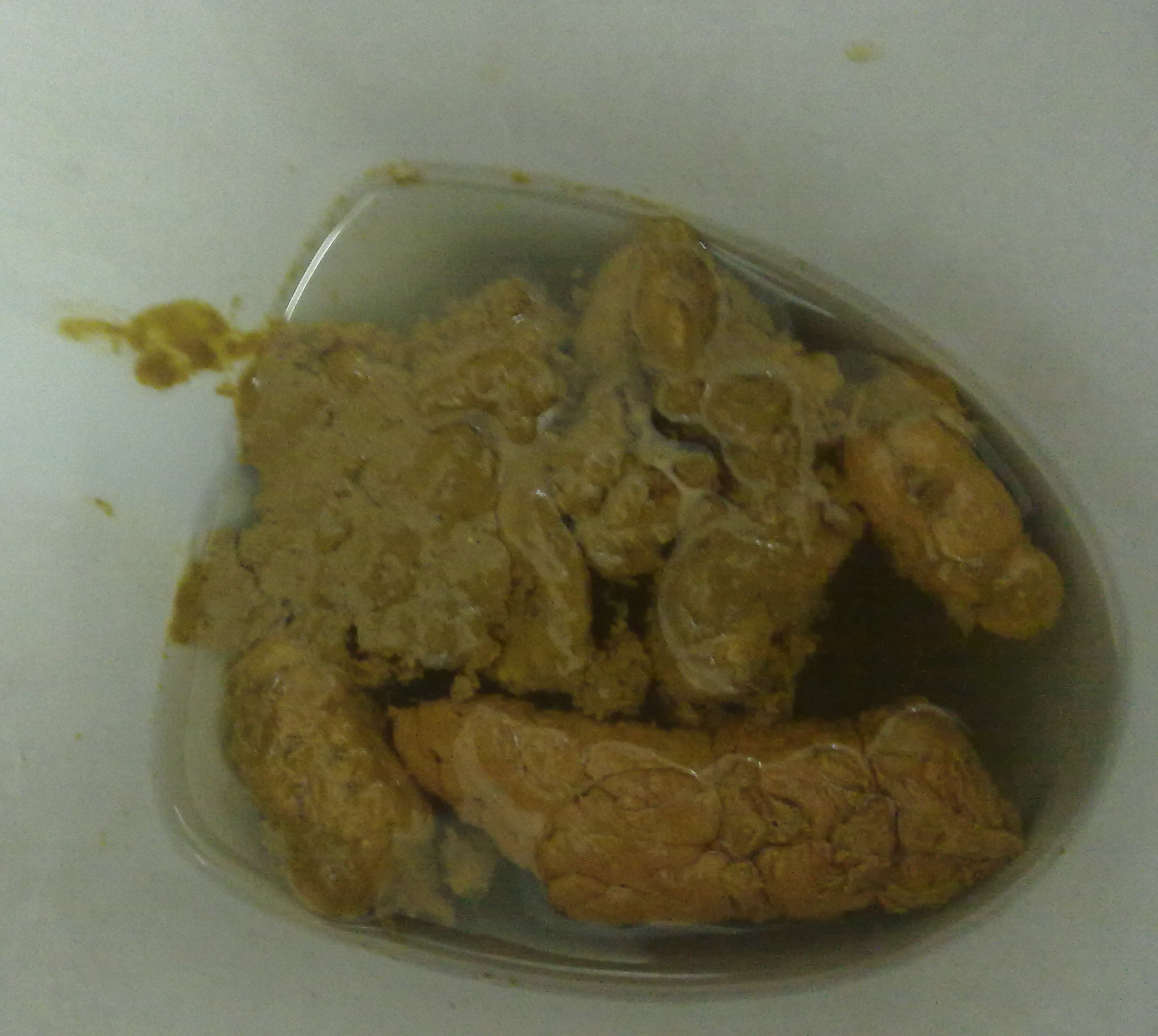 മനുഷ്യന്റെ മലം